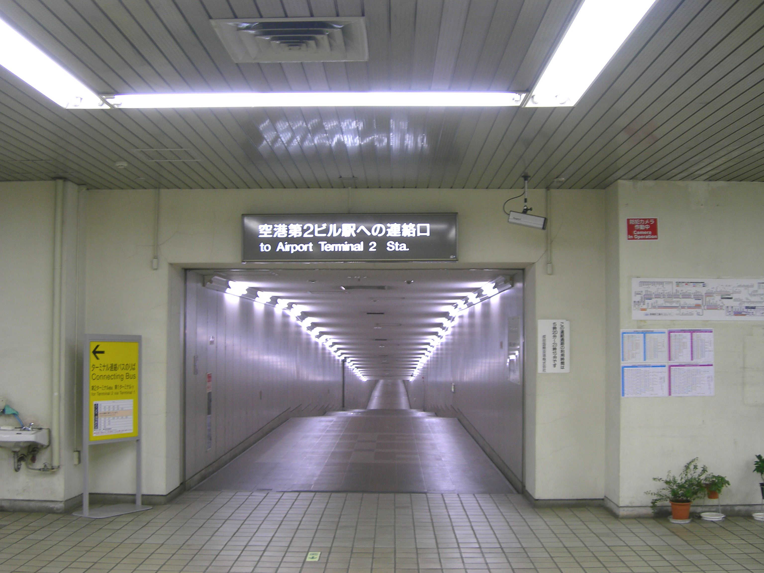 東成田駅改札口脇にある成田空港第2ターミナルビルへの連絡通路。